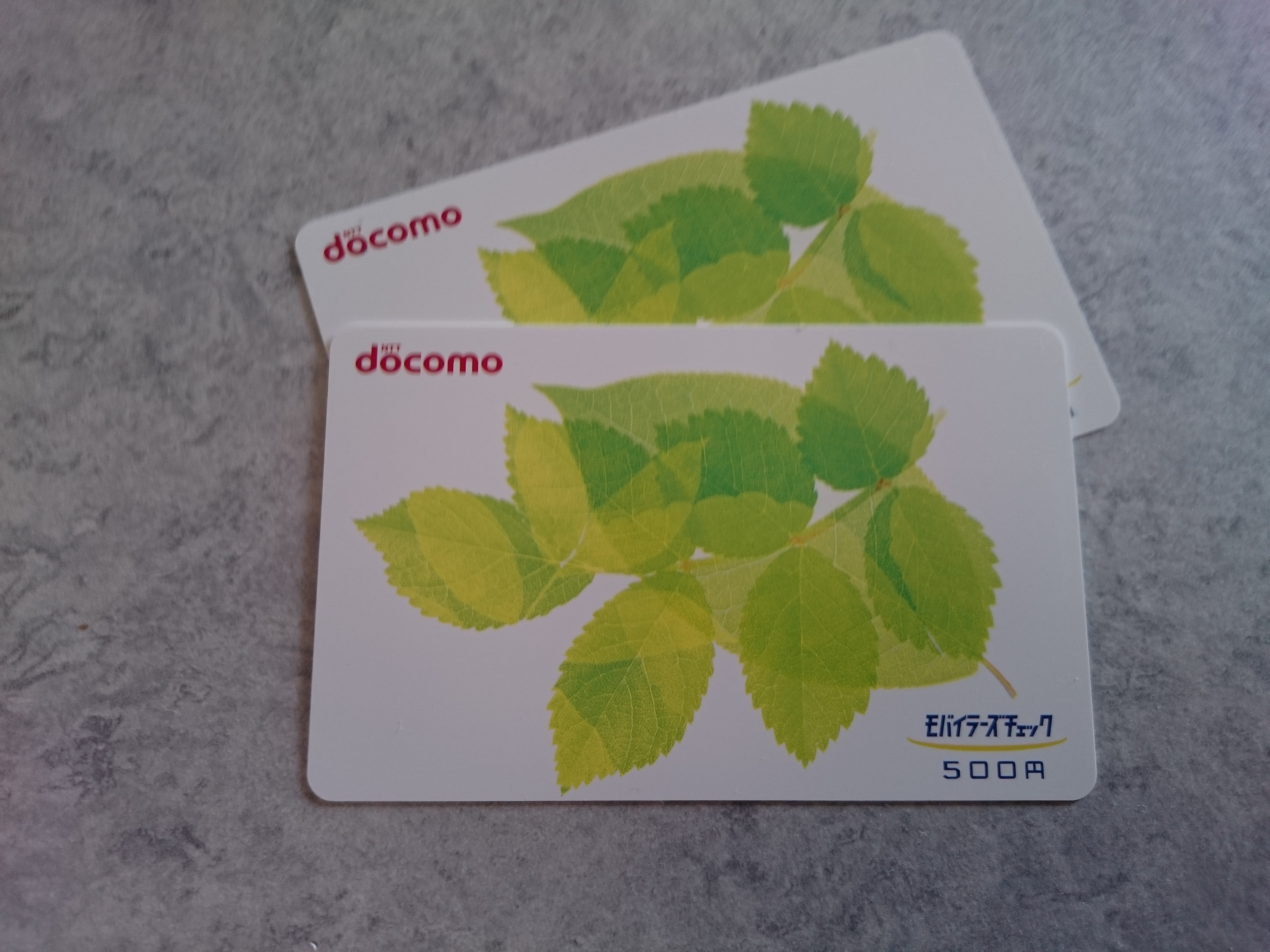 NTTドコモのモバイラーズチェック500円分です。